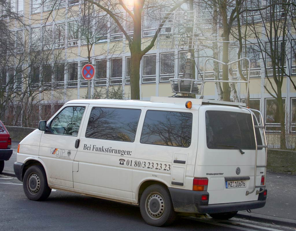 Servicewagen der Regulierungsbehörde für Telekommunikation und Post. Kamera: Canon EOS 300D